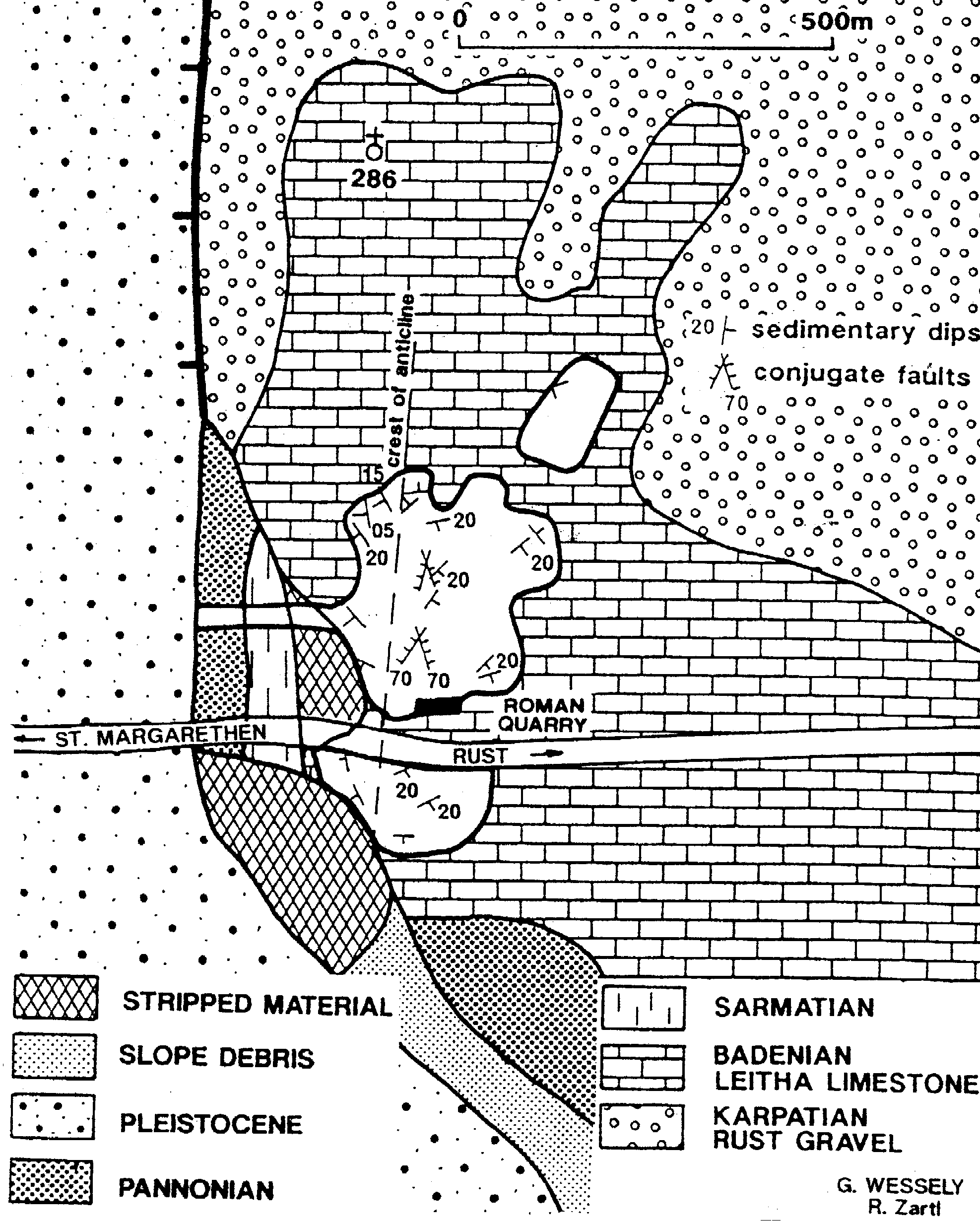 Skizze der Geologie im Steinbruch St. Margarethen